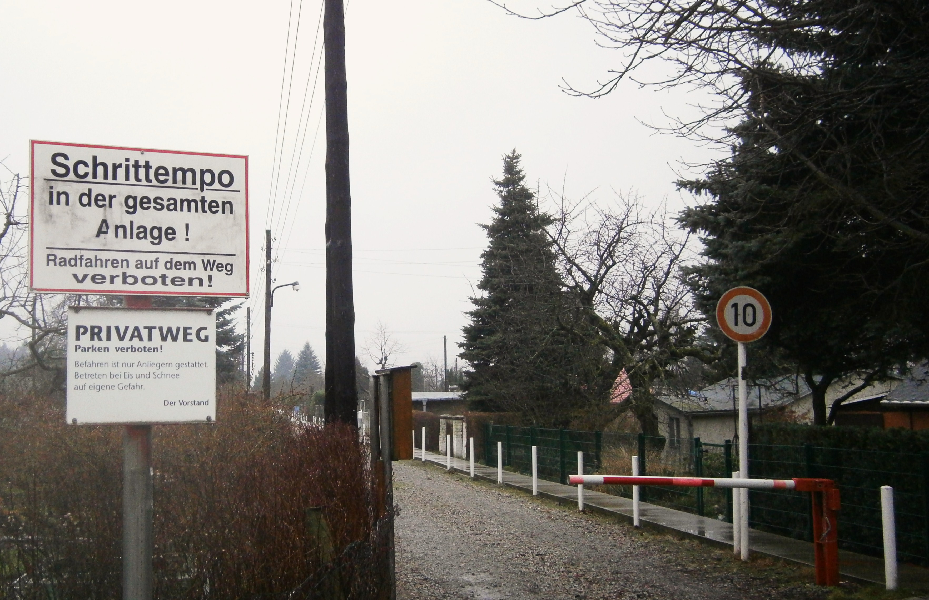 Die Friedenswegbrücke ist eine Brücke über den Nordgraben, sie liegt am Tripelpunkt der Ortsteile Blankenfelde, Rosenthal und Französisch Buchholz im Berliner Bezirk Pankow. Hier der Blick vom Rosenthaler Brückenkopf nach Südost in den namensgebenden Friedensweg ein Anlagenweg (Privatstraße) zur Dietzgenstraße.